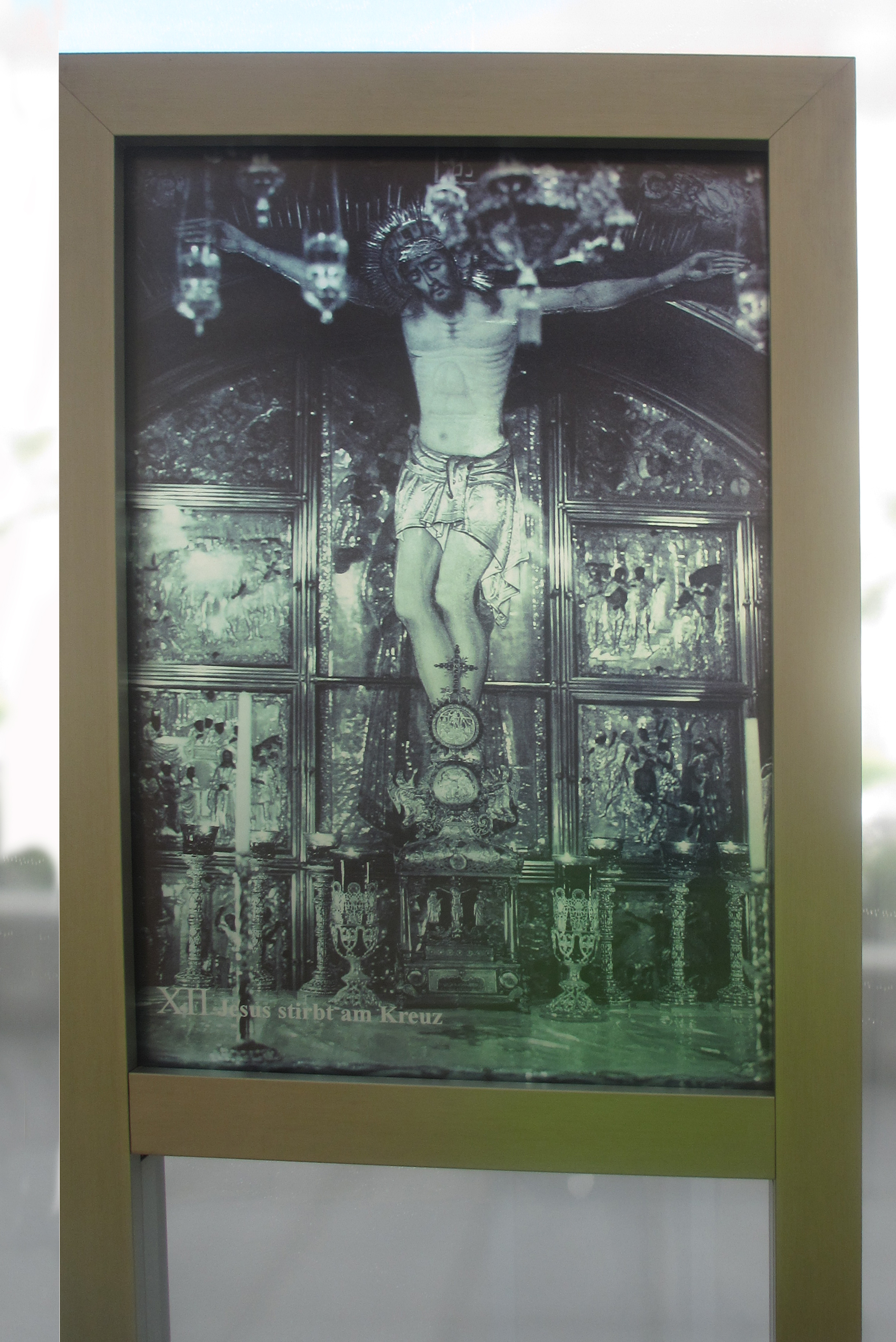 Kreuzweg des Künstlers Matthias Wähner im Kreuzgang der Herz-Jesu-Kirche in München. Die verschiedenen Stationen der Leiden Jesu werden durch Schwarzweiß-Fotografien der entsprechenden Stationen auf der Via Dolorosa in Jerusalem illustriert.